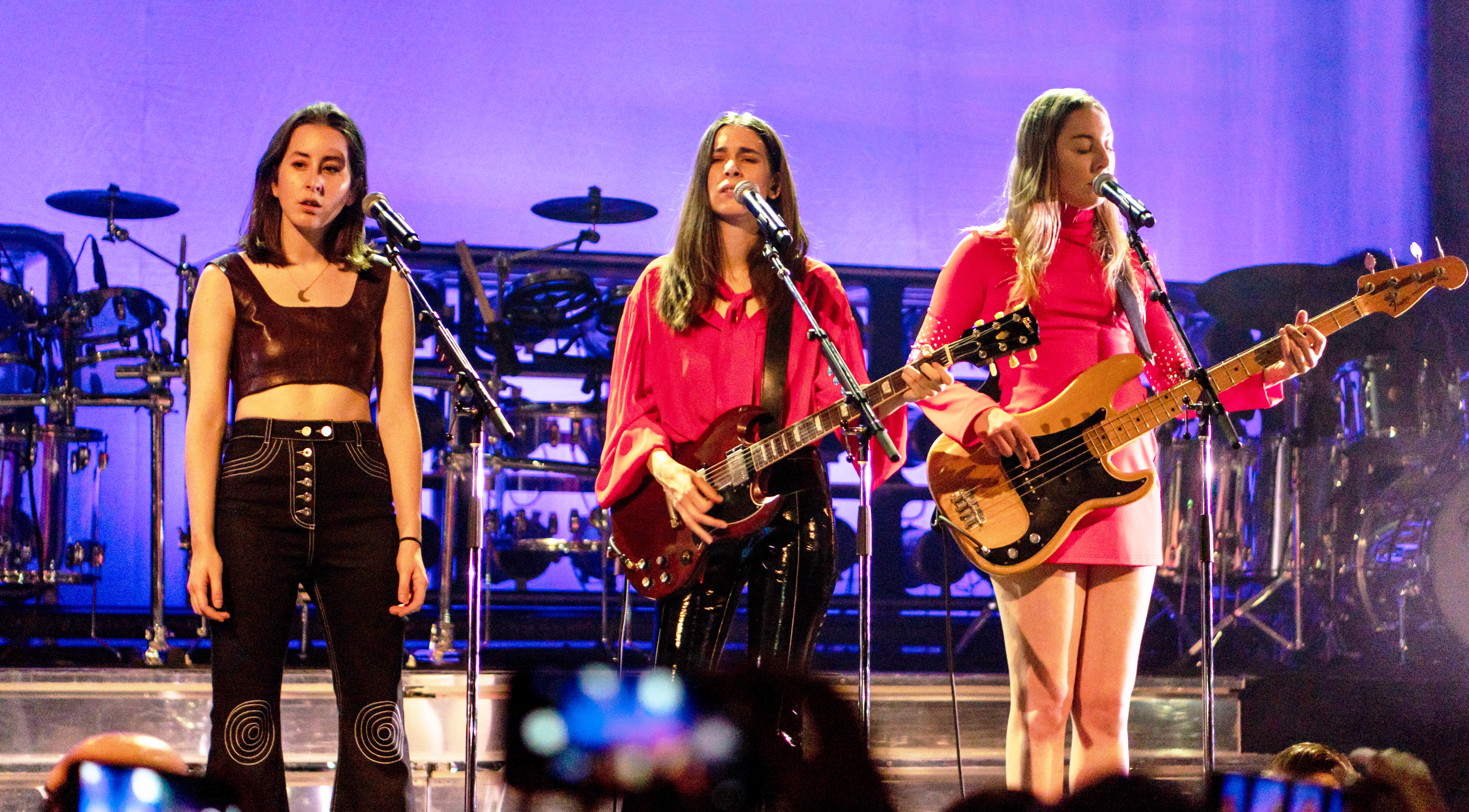 HaimFoxPomona110418-25